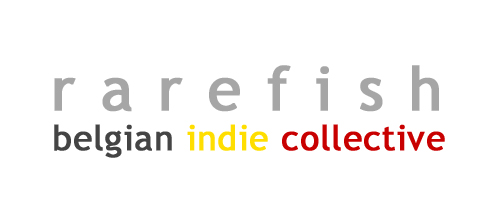 Logo van het Rarefish collectief. Vrij te verspreiden.